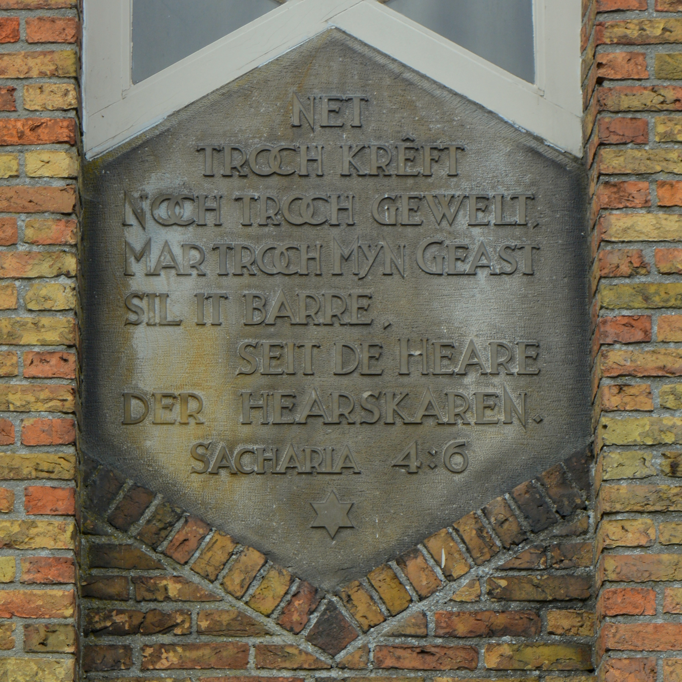 Twijzel, geref. kerk, gevelsteen